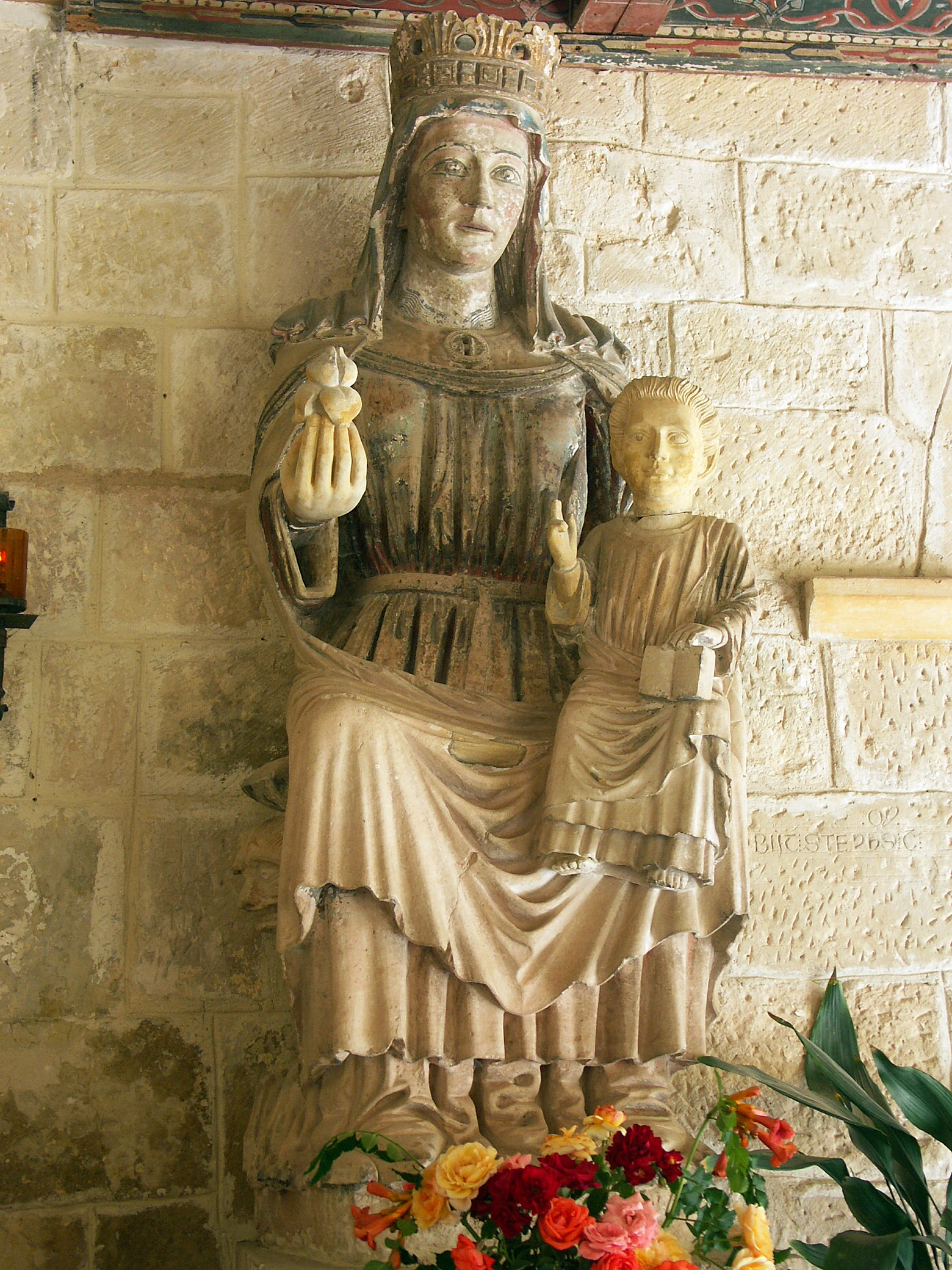 Nuestra Señora del Marzo, Sto. Domingo de Silos, Spanien, im Kreuzgang des Klosters